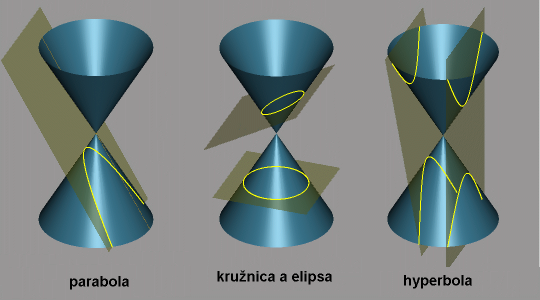 conic section , description in sk